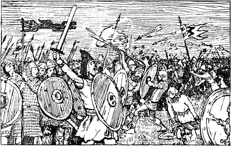 Christian Krogh: Illustration for Håkon den godes saga, Heimskringla 1899-edition. nn: «Hald fram som du stemmer!» nb: «Hold fram som du stevner!»